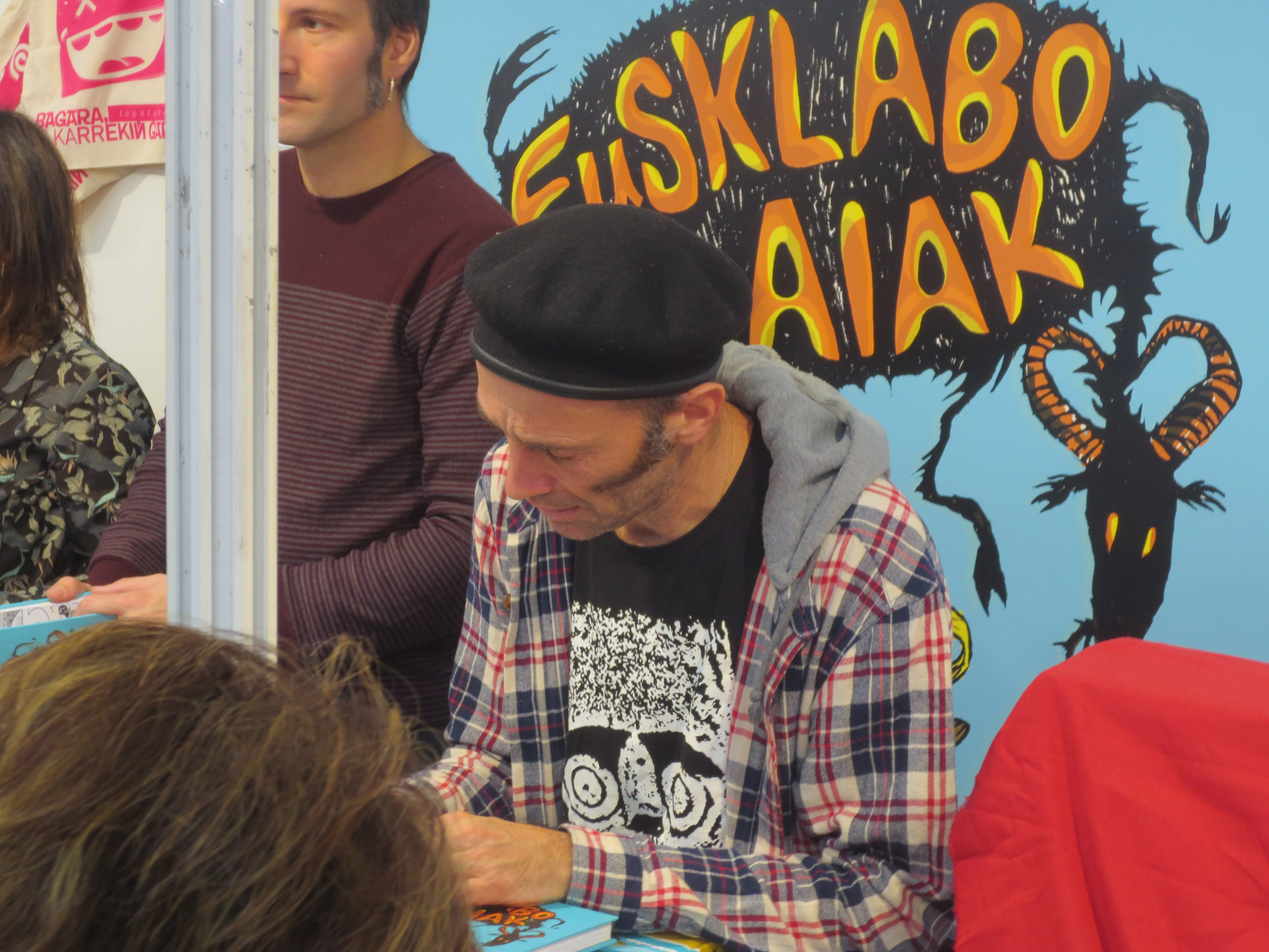 Asisko Urmeneta Durangoko 52. azokan